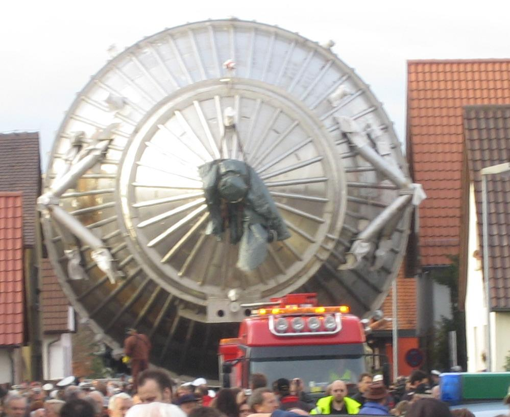 Spektrometertank KATRIN beim Transport auf 2 gekoppelten selbstfahrenden Tiefladern durch Leopoldshafen.